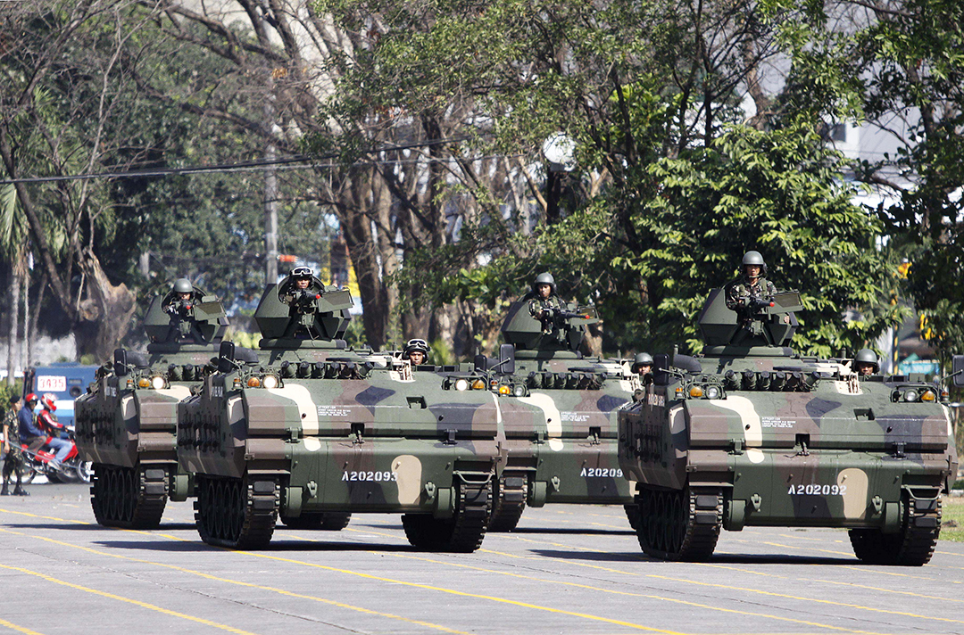 Philippine Army AIFV in parade